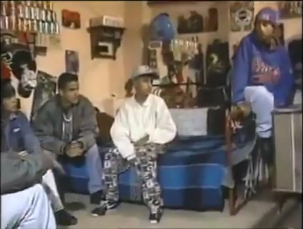 La Etnia, Alto Al Secuestro (1993)